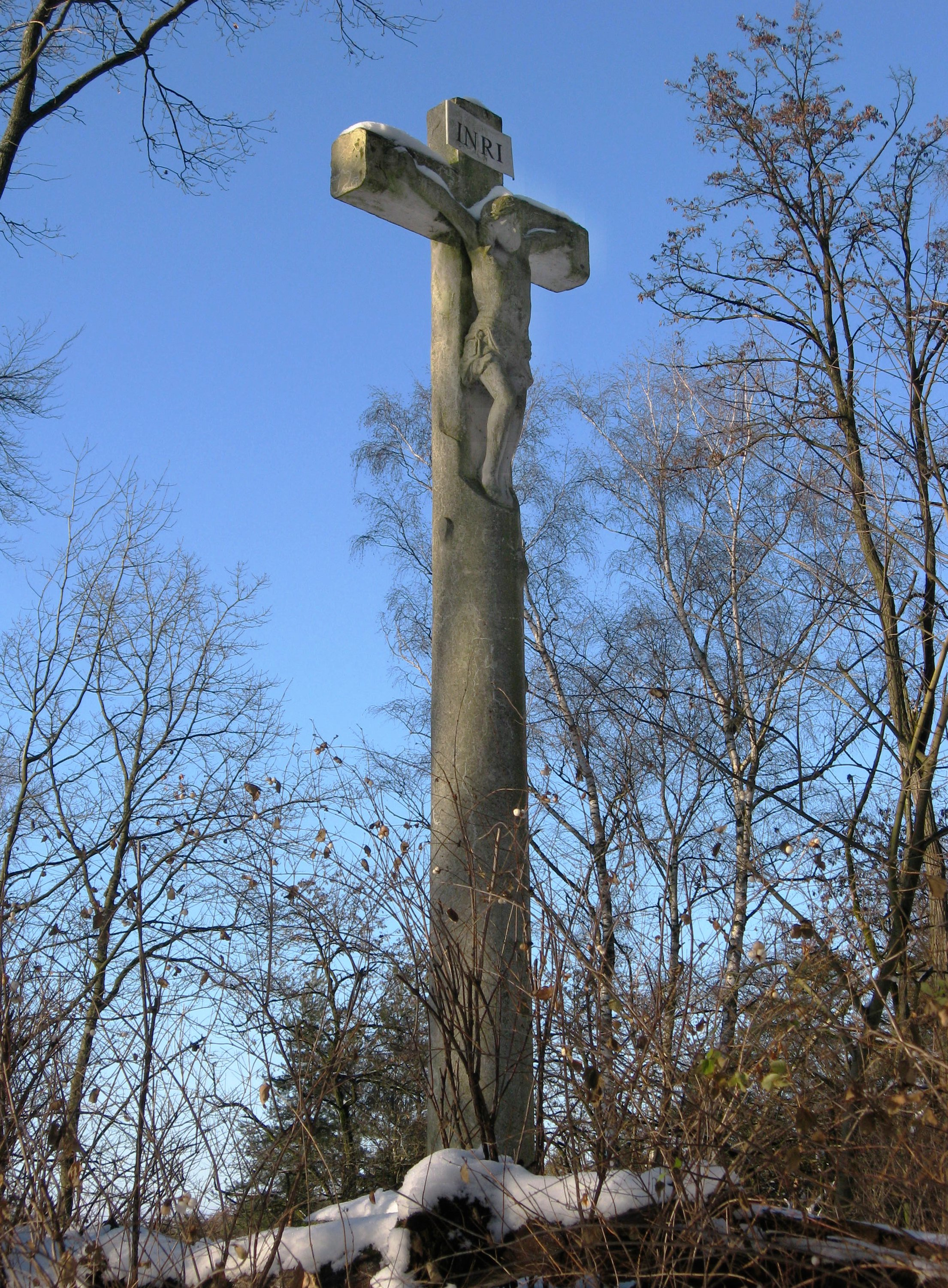 Das Kreuz von 1837 am Ehrenmal wurde vom Pfarrer der Pfarrei St. Johann Philipp Schmitt (1805 - 1856) geschaffen.